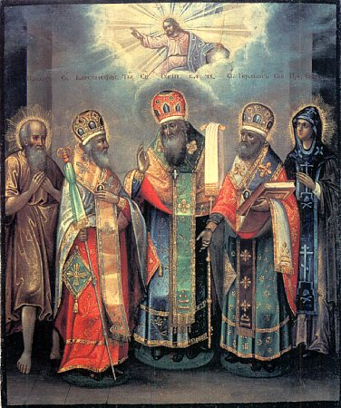 Icono ruso del s. XVIII-XIX, con, de izquierda a derecha: San Pablo el Simple, Barsanufio de Tver Guri, Germán de Kazán y Eudoxia